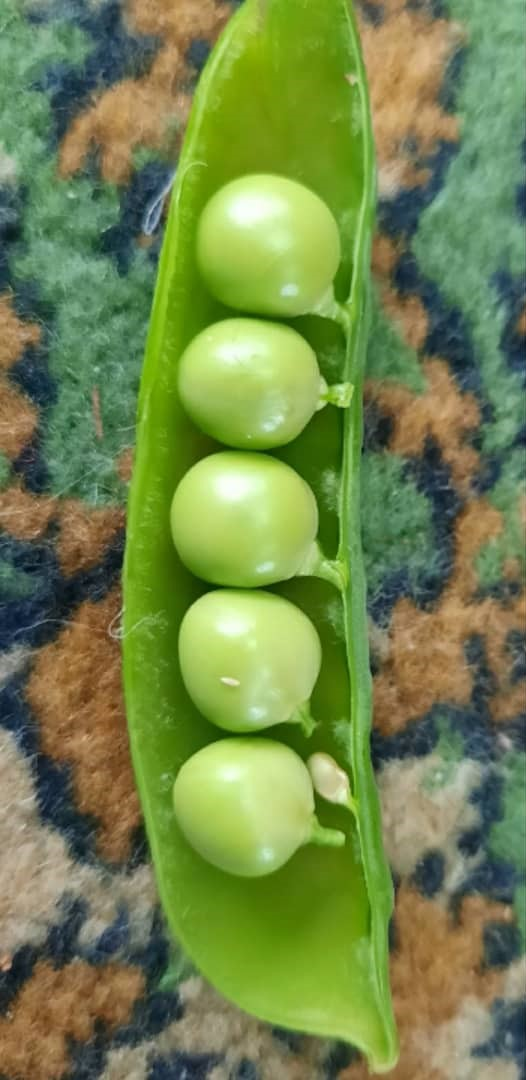 Pea pod. Eastern Siberia